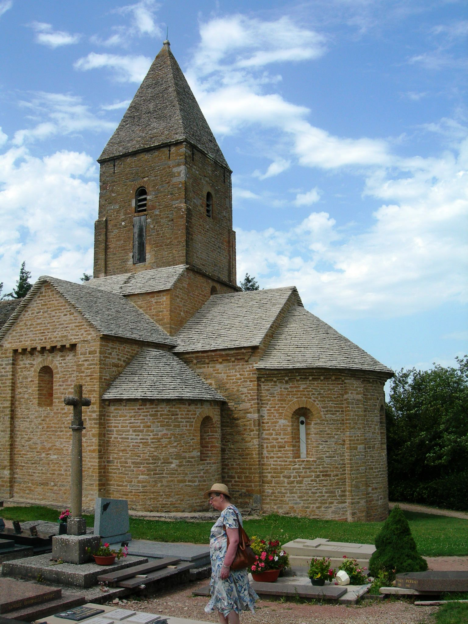 Brancion, eglise)